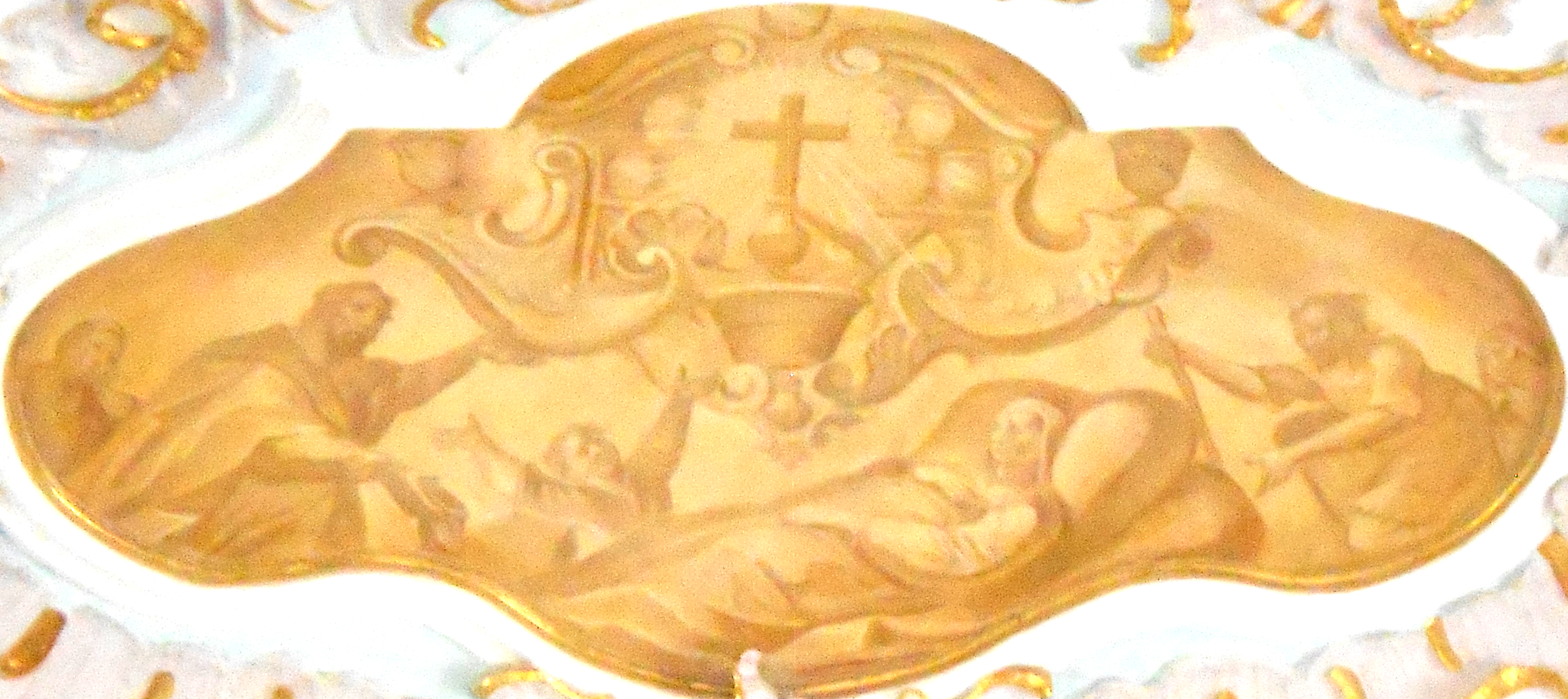 Fresco of Heilig Kreuz (Mindelaltheim)